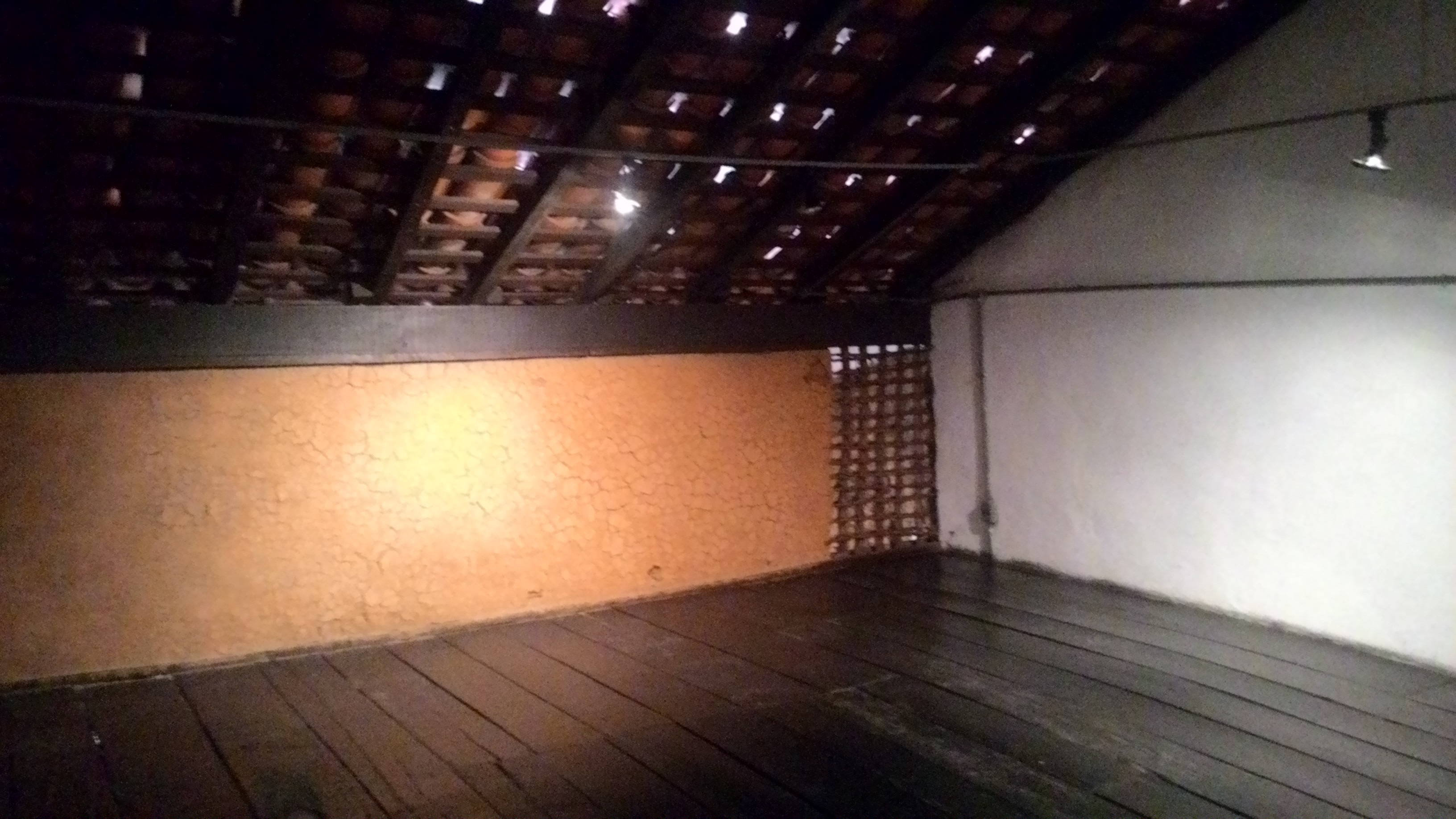 Arquitetura de cômodo no segundo andar da Casa do Sítio Tatuapé, em São Paulo (SP), Brasil.